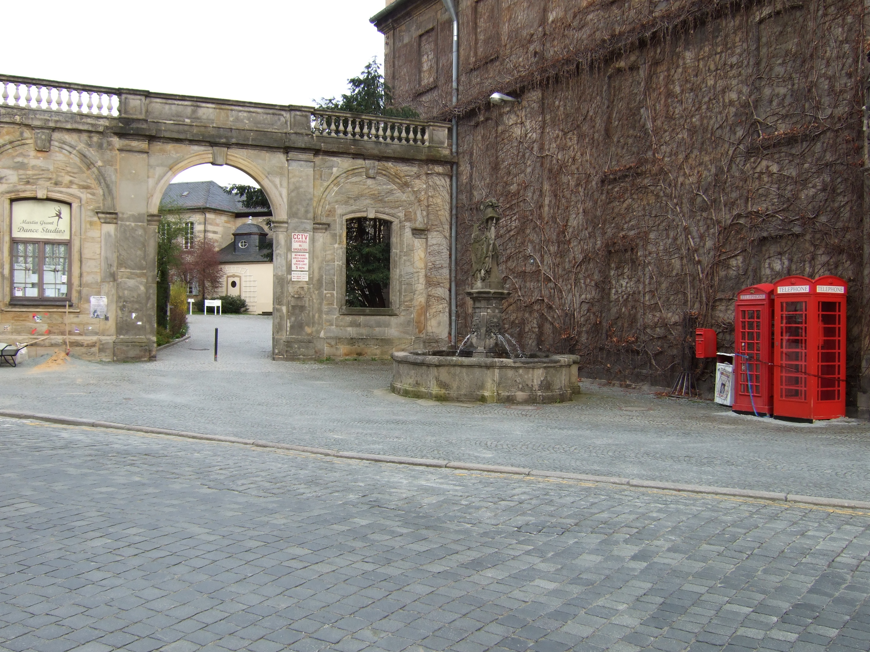 Südwestlicher Eingang Hofgarten Bayreuth, Ludwigsstrasse